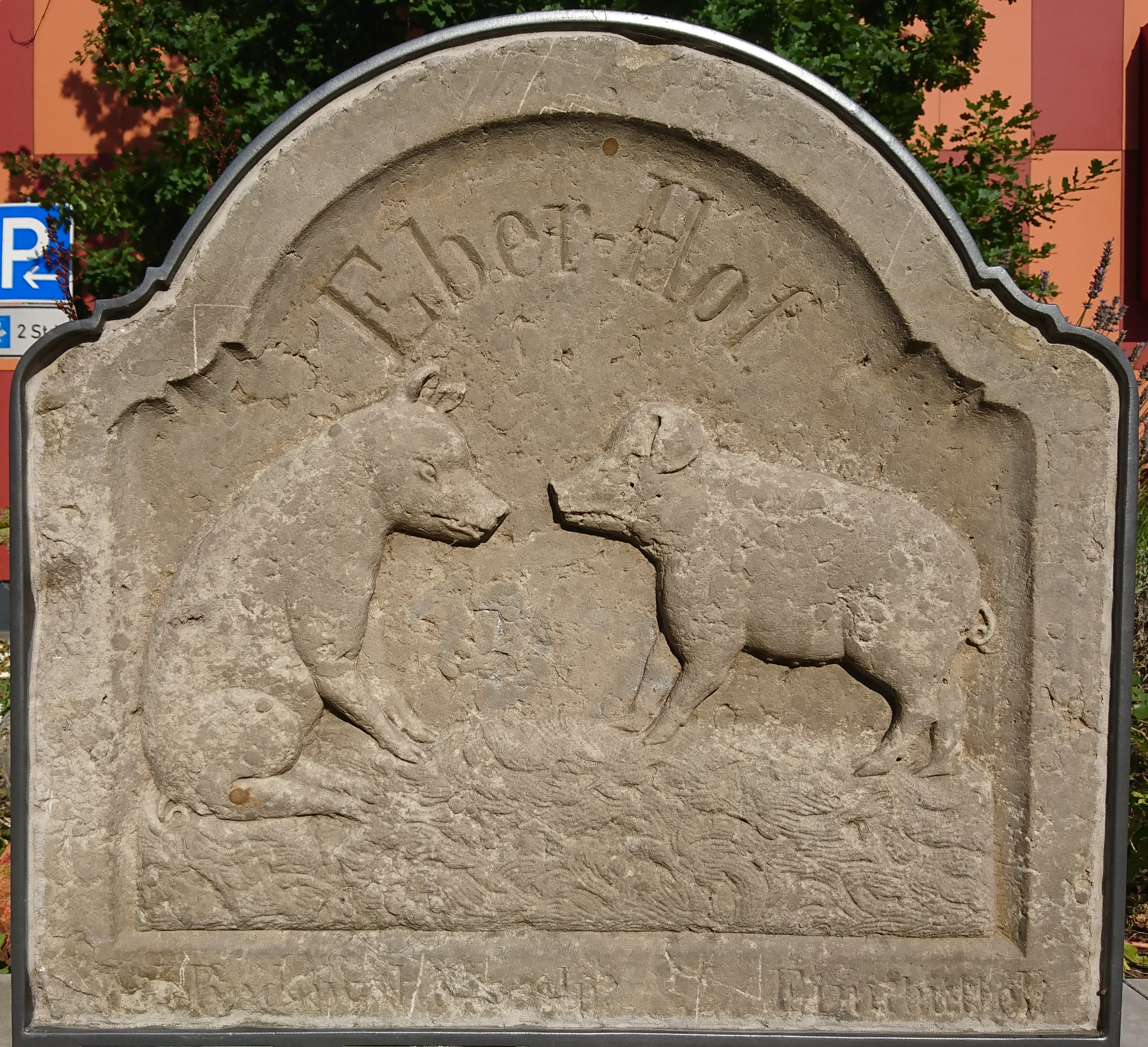 Sandsteinrelief Eber-Hof, mit einem sitzenden Eber und einer stehenden Sau, von W. Rodewoldt (aus Eimsbüttel), Inschrift unten links W. Rodelwoldt sculp. (sculp.: lateinisch, Abkürzung für skulpturierte es) und unten rechts Eimsbüttel. Ca. aus dem Jahre 1890. Eintrag im Hamburger Adressbuch von 1890: Rodewoldt – H. T. W., Steinhauer, Fruchtallee 74a. Siehe hier. Die Eigentümerin Anke Rathig (seit 1977 Vorsitzende der DRK-Ortsgemeinschaft Langenhorn / Fuhlsbüttel), Tochter des Retters des Reliefs, stellte es Oktober 2015 Hamburg-Langenhorn zur Verfügung. Neben dem Relief wurde eine Tafel zu Erklärung aufgestellt. Diese hier: Schautafel